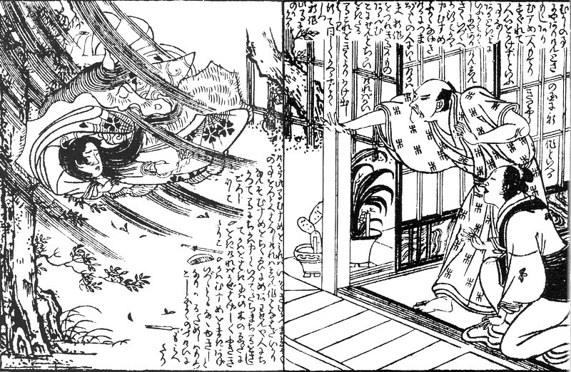 Heterogamy from Momonga-Kokaidan (模文画今怪談)